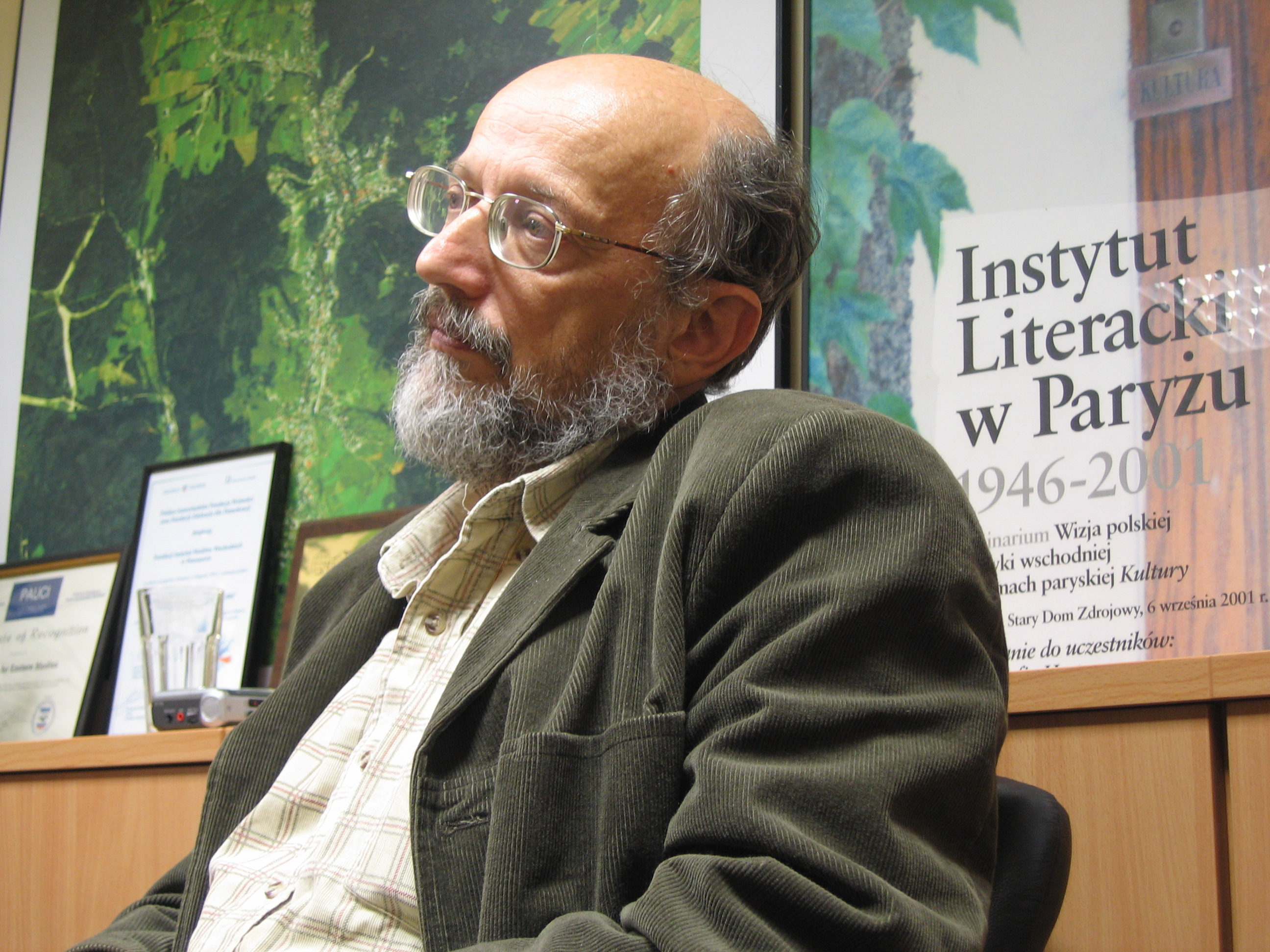 Adam Krzemiński (b. 1945), Polish journalist